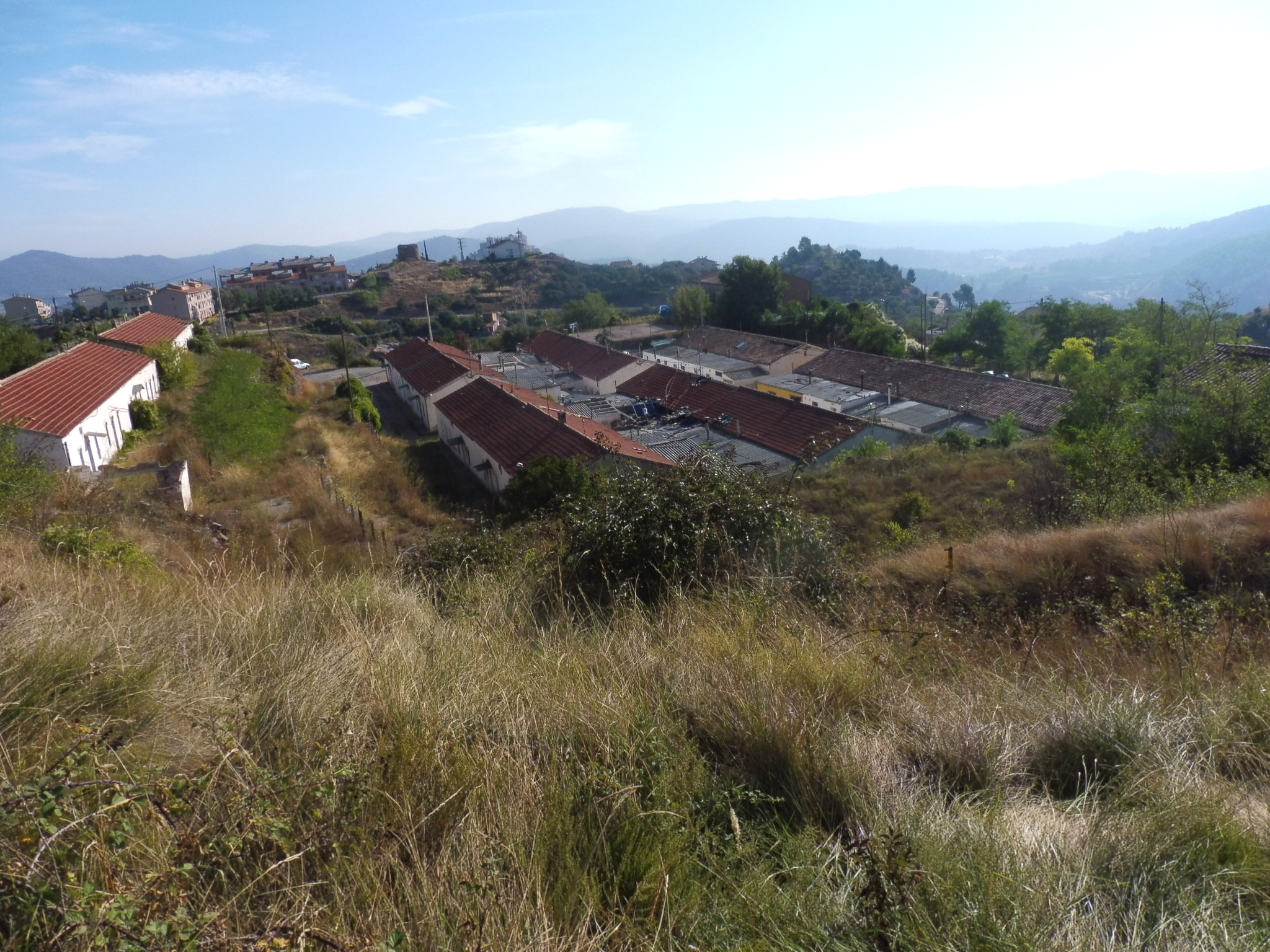 La Colònia dels Arquers (Cardona)